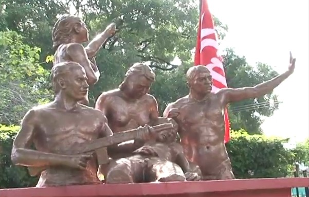 Monumento a los caidos durante la ofensiva general de 1980.